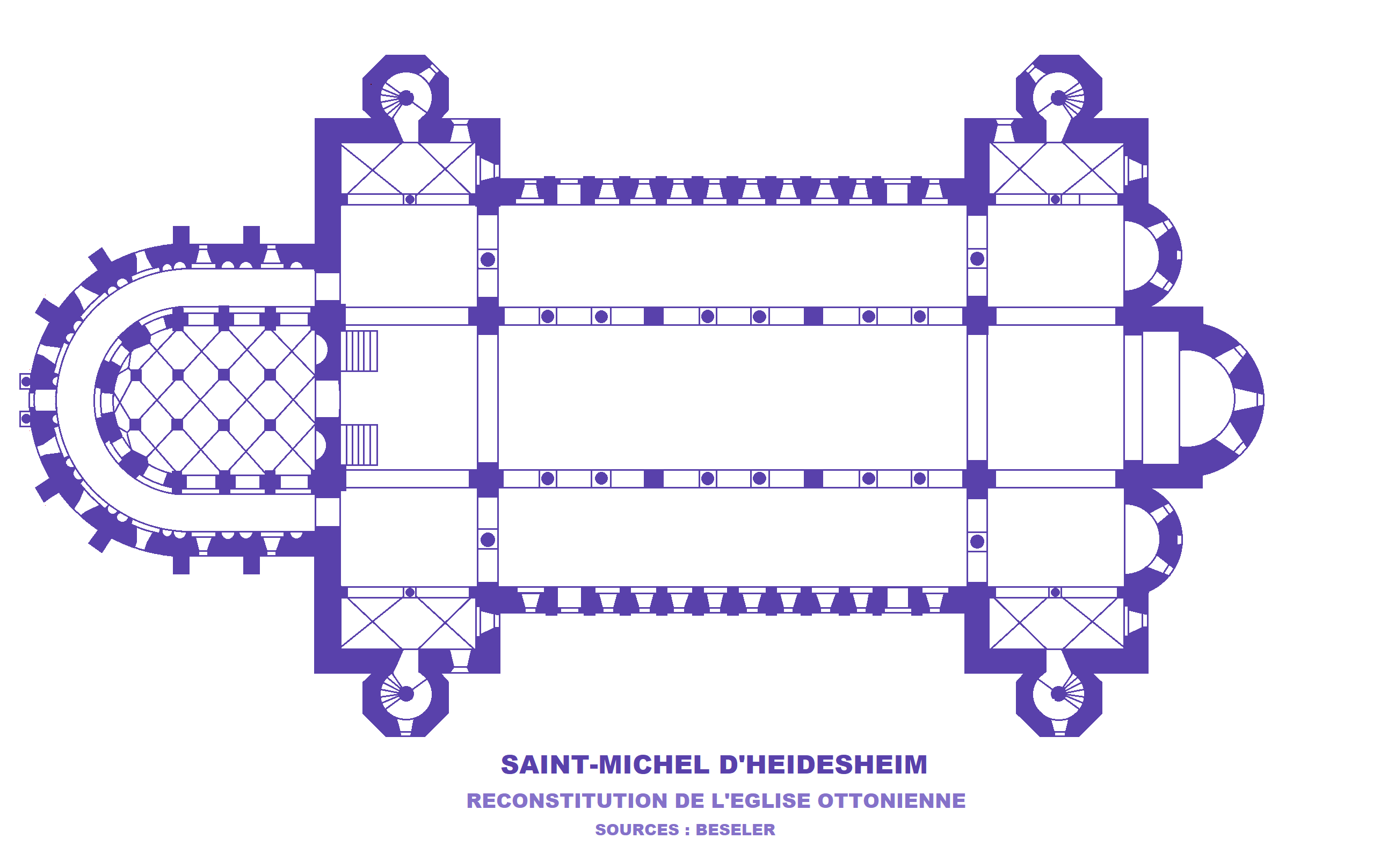 Eglise Saint-Michel d'Hildesheim, plan restitué de l'église ottonienne